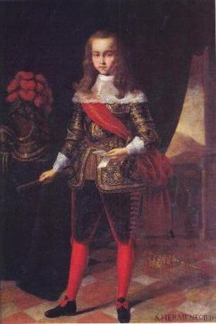 Retrato de Juan José de Austria (1629–1679), que fue un destacado político y militar español e hijo ilegítimo del rey Felipe IV de España y de la actriz María Calderón.